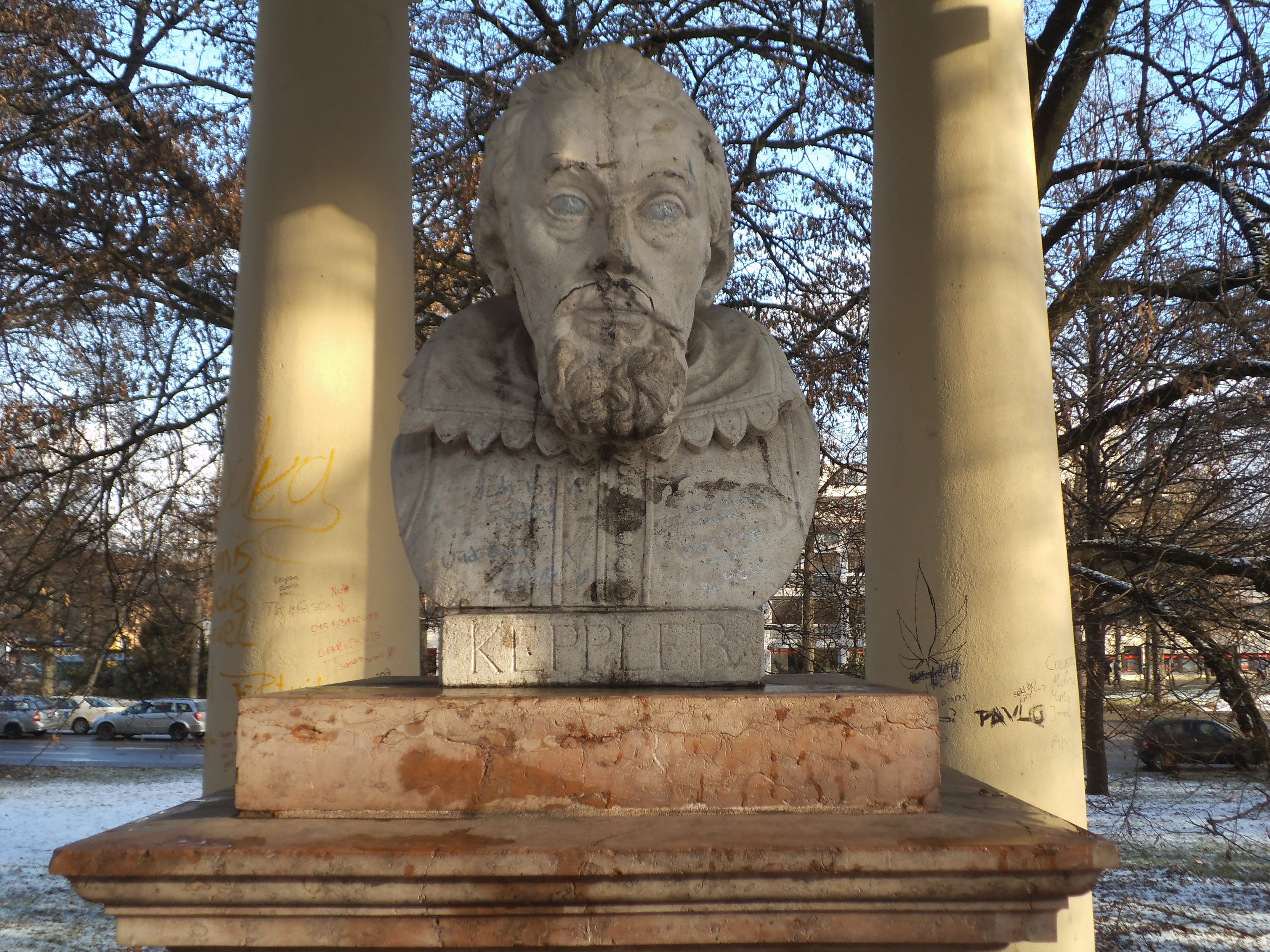 Busta Jana Keplera v Řezně poblíž vlakového nádraží